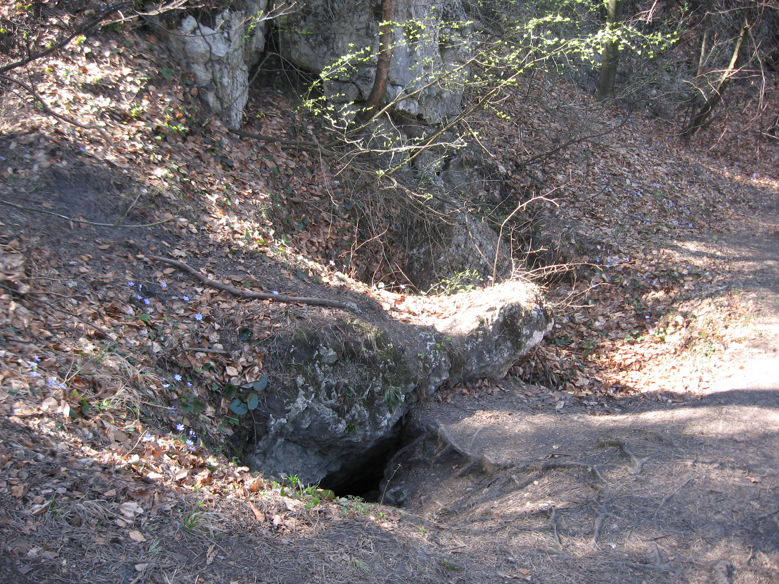 Jeden z otworów jaskini Brzęczki na Świniuszce